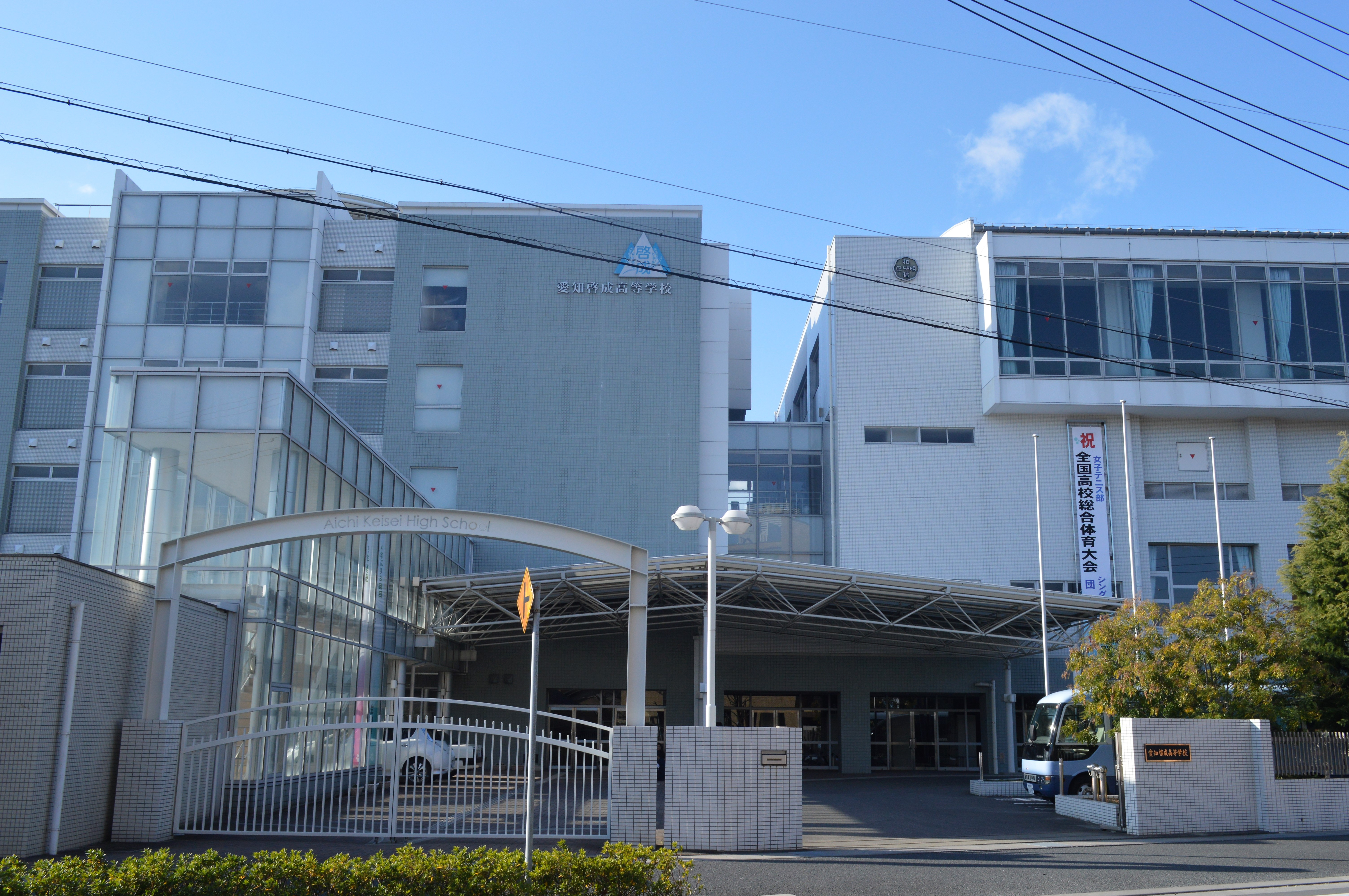 愛知県稲沢市の愛知啓成高等学校（愛知啓成高校）。